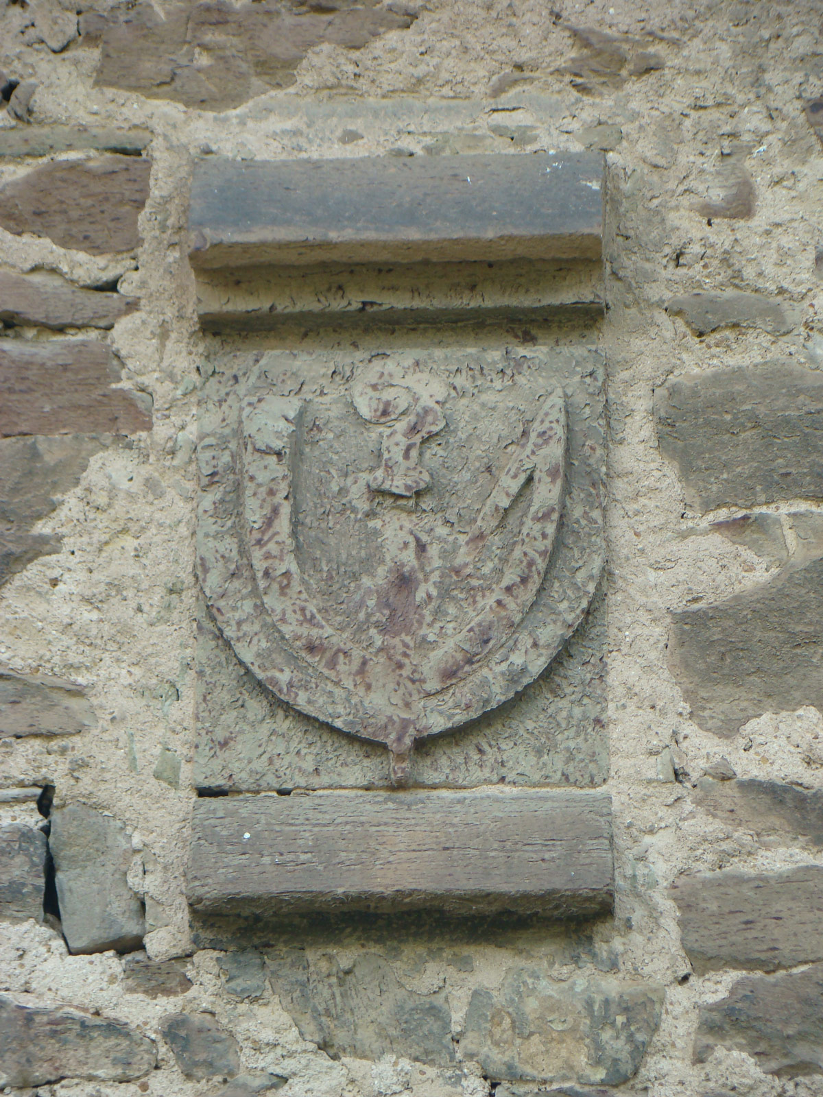 Wappen des Abtes Dieter II. von Angelach am Stifterhof bei Östringen-Odenheim, bauliche Überreste des Klosters Odenheim